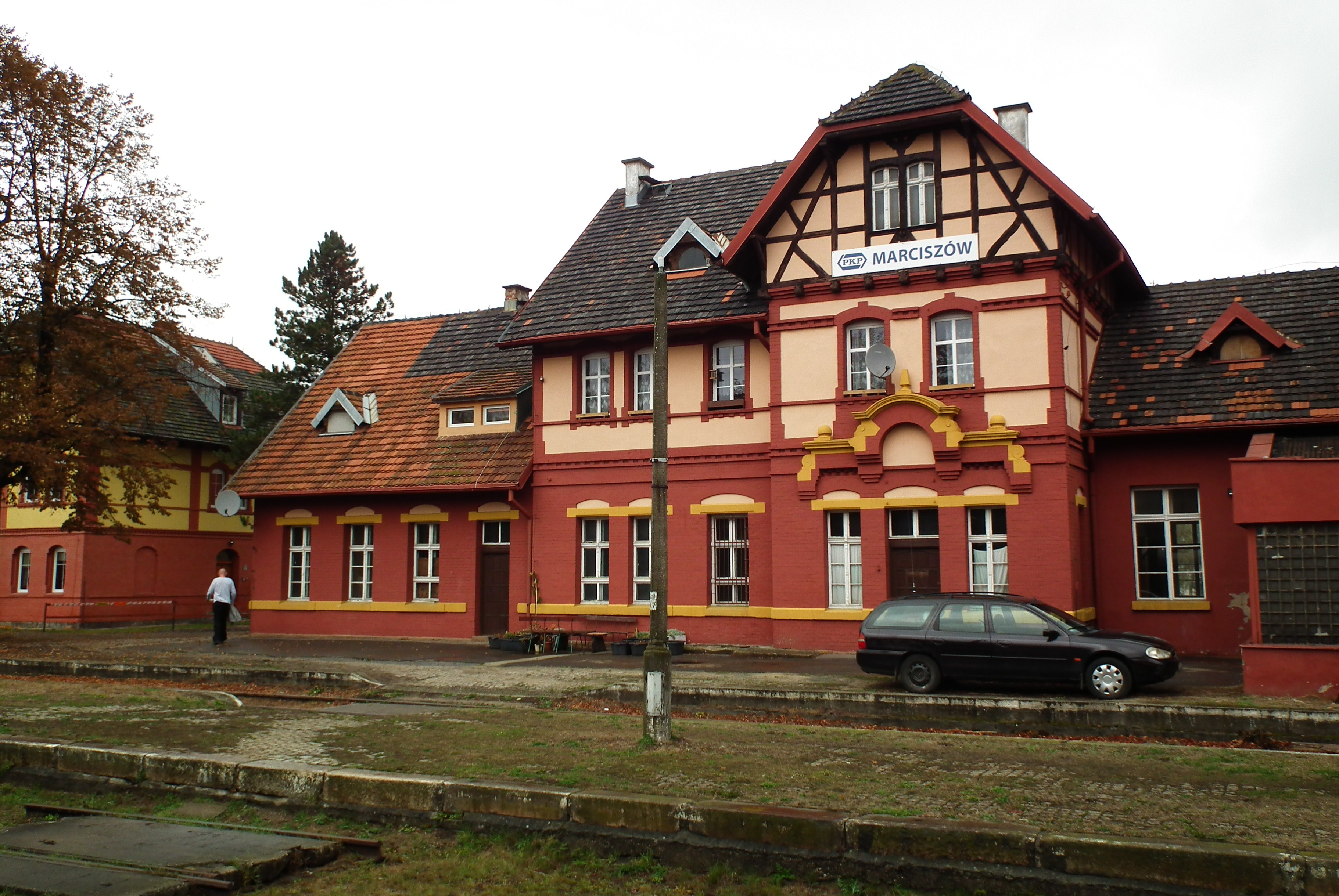 Marciszów. Zabudowania stacji kolejowej.